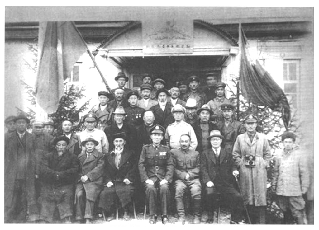 1946年，三区方面的阿合买提江代表与国民政府谈判代表一行。前排右四为阿合买提江，右五为张治中。